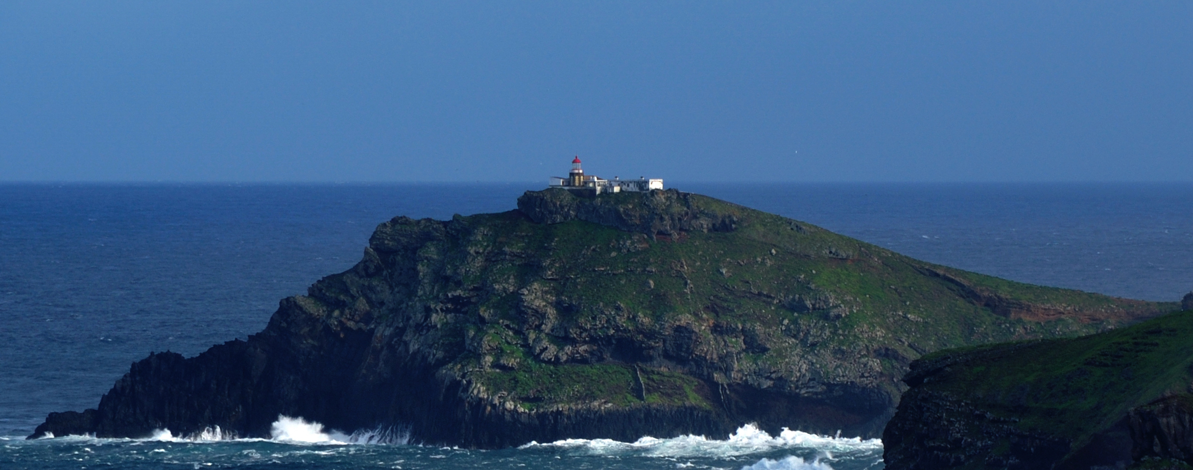 Portugal, Ilhéu e Farol da Ponta de São Lourenço